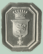 Das Dienstsiegel mit Initiale "S" und darunter die Abbildung des hann. Guelphen-Ordens. Über dem Ganzen die Krone des Königs von Hannover. Dieses Dienstsiegel bekam Dietrich Wilhelm Stolte 1833 für sein Amt als Stadtkommandanten von Emden und behielt es auch als Stadtkommandant von Aurich, der er ab 1838 war bis zu seinem Tode 1851 war. Freigegeben von Jochen Stolte